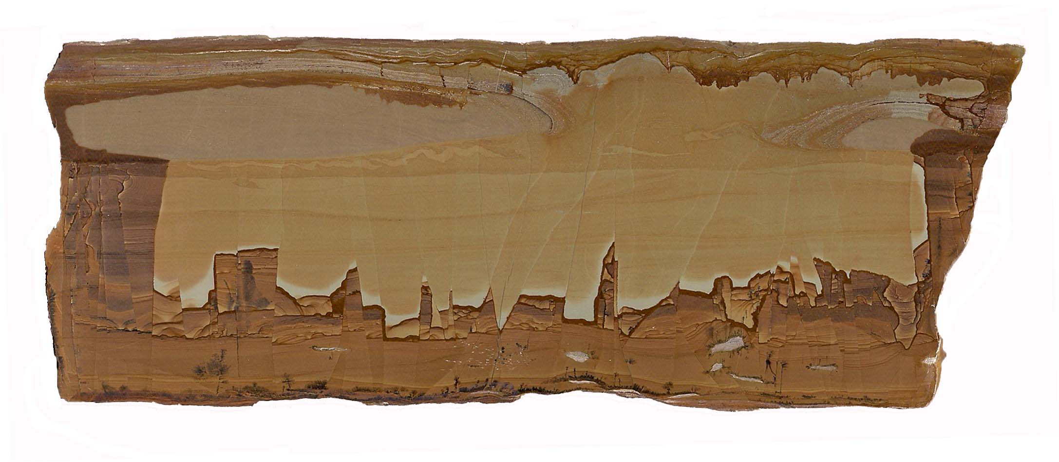 Lastra tagliata e lucidata di Pietra Paesina di Firenze